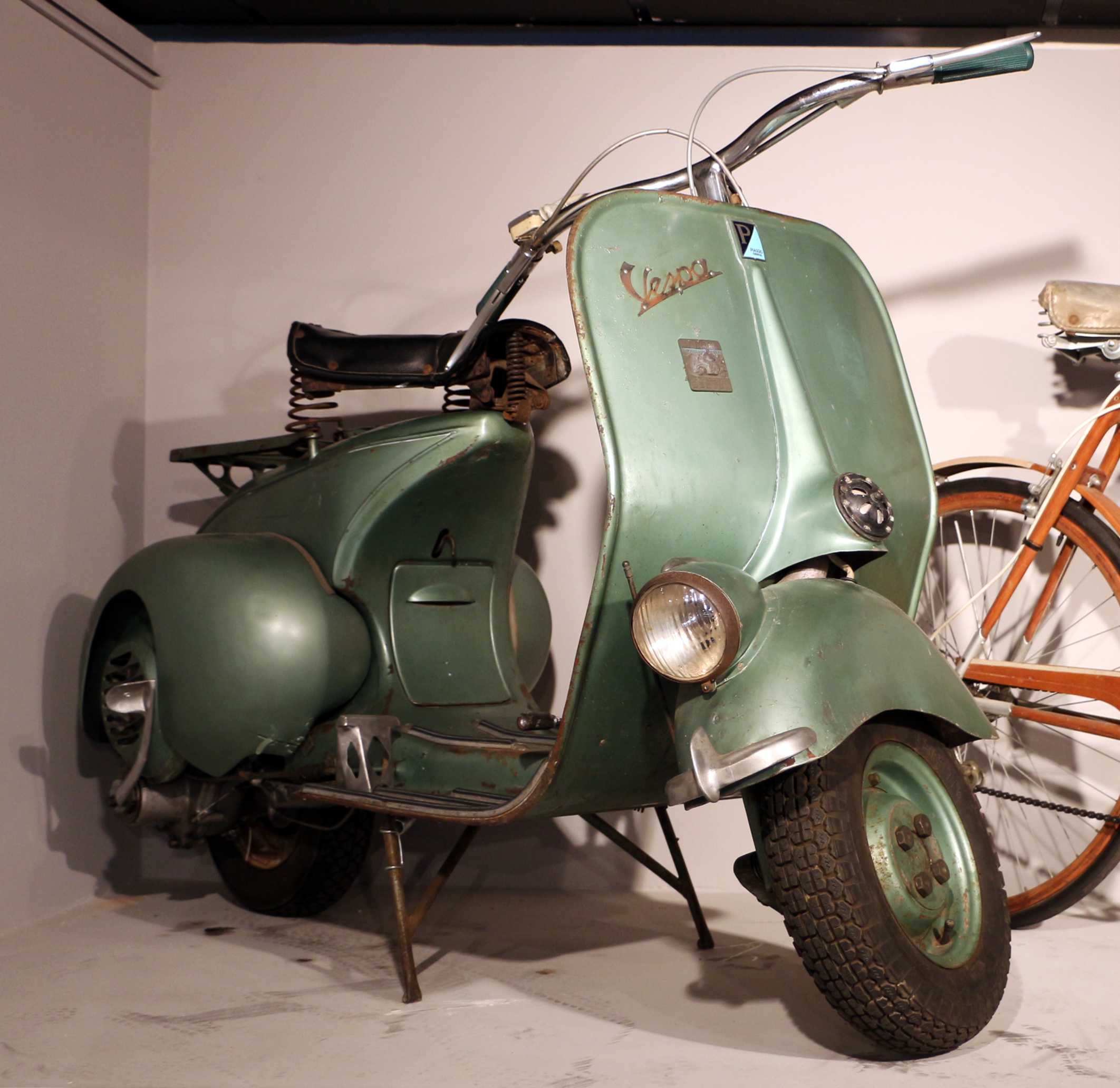 Il parco e i musei di Nervi This is a photo of a monument which is part of cultural heritage of Italy.